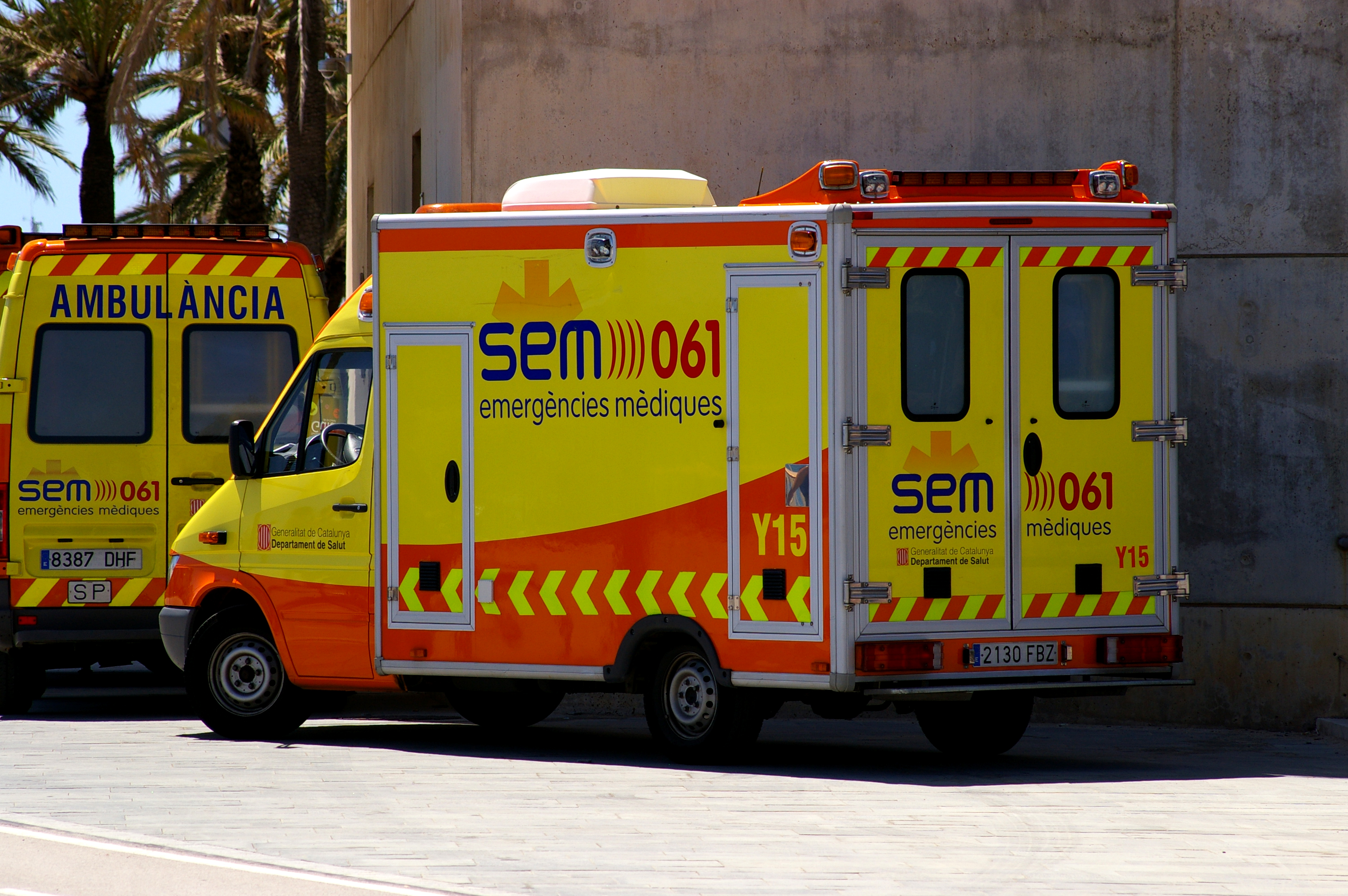 Ambulància del SEM-061 a Barcelona, Catalunya